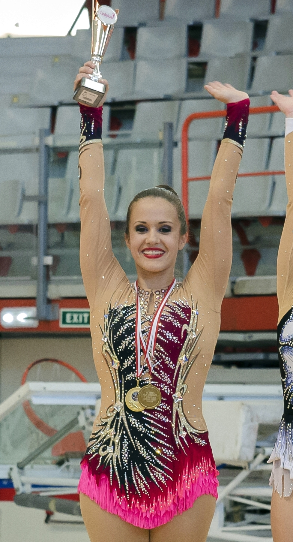 La gimnasta Raquel Rodríguez con la copa de vencedora en el podio de la general sénior en el XIV Torneo Nacional «Villa de Jovellanos» para nivel federado el 30 de mayo de 2015 en el Palacio de Deportes de Gijón. Raquel obtuvo el oro además tanto en aro como en cinta.